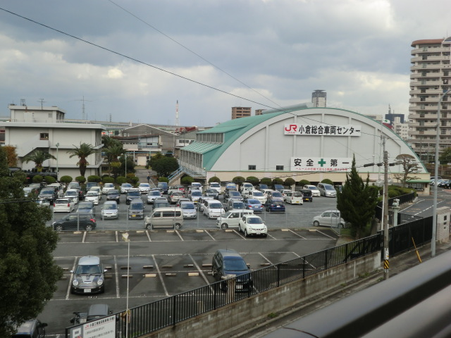 小倉総合車両センター。福岡県道270号の陸橋から北東の方向を見る。